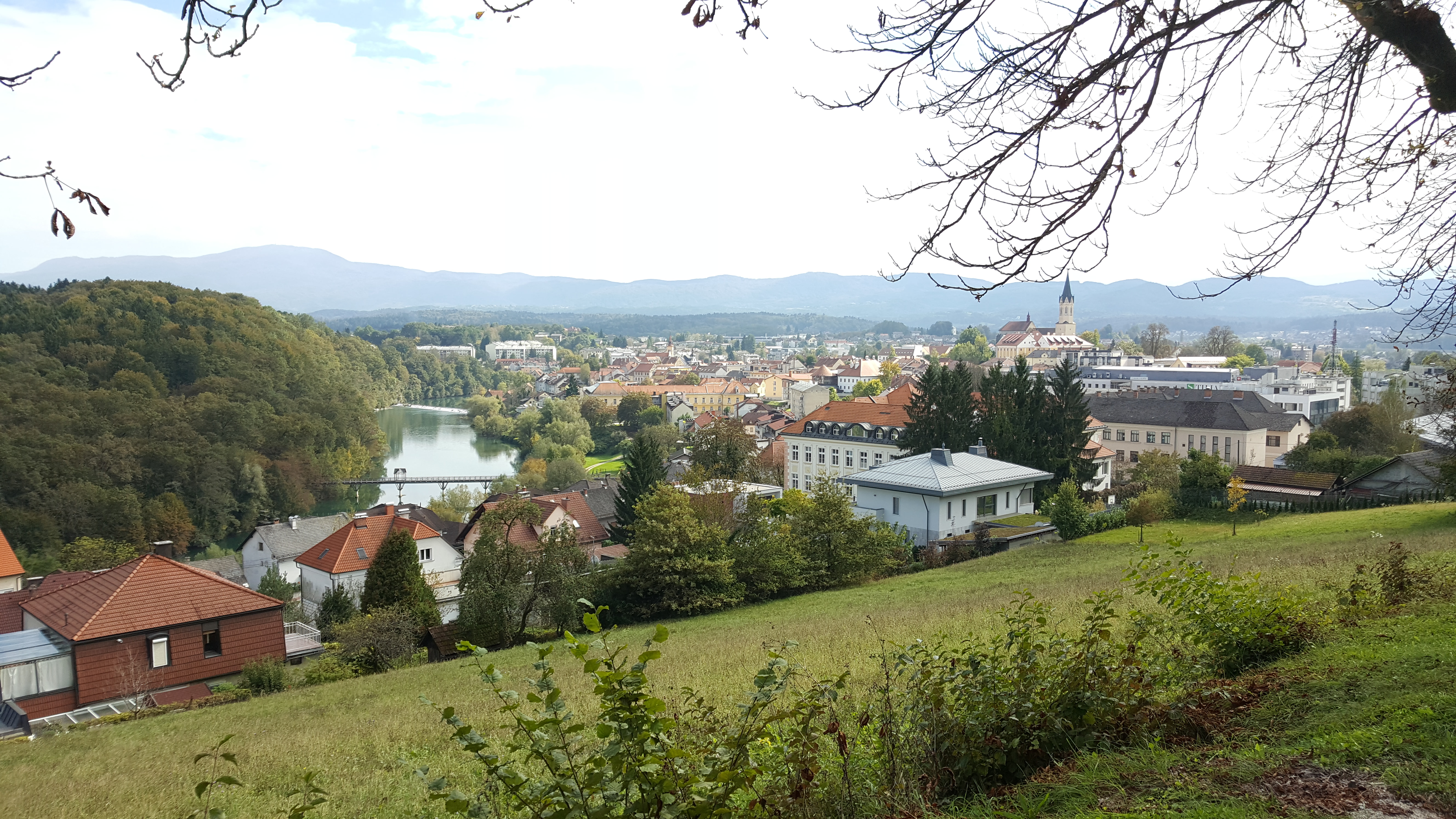 Pogled z Marofa